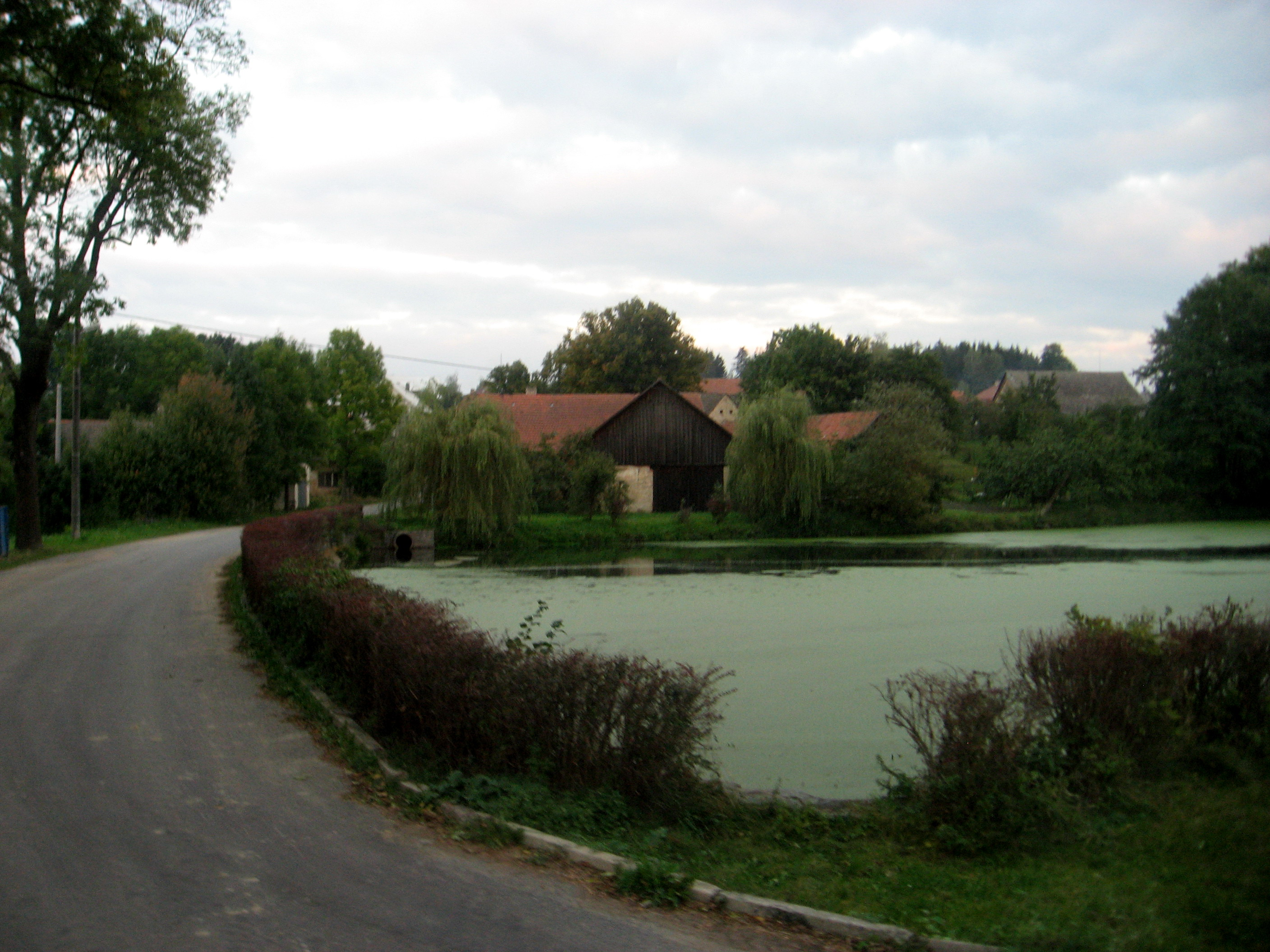 Branišov, rybník